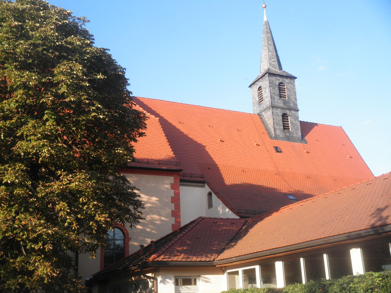 pilgrima kirko de Waghäusel